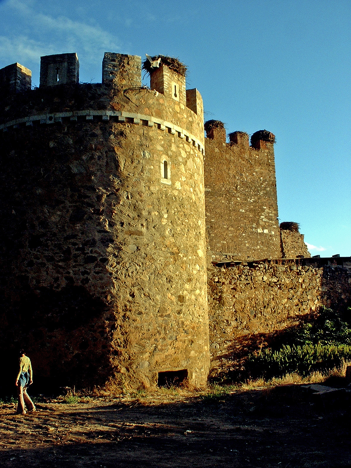 Restos de murallas en Alija del Infantado (León)